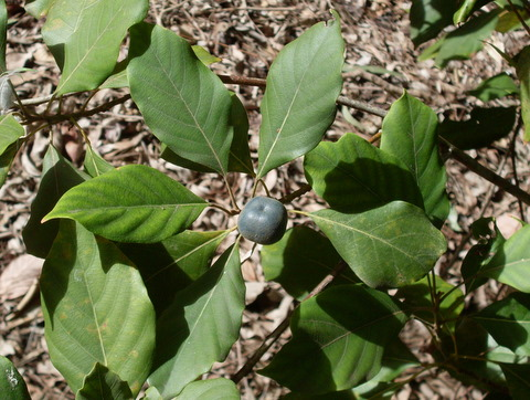 Elaeocarpus sedentarius fruit & leaves